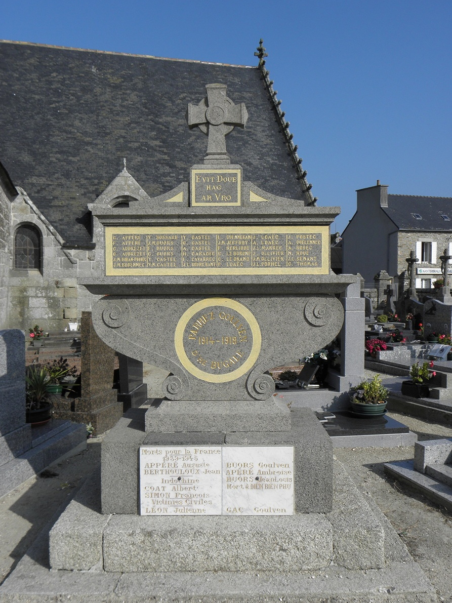 Monument aux morts de Goulven (29).